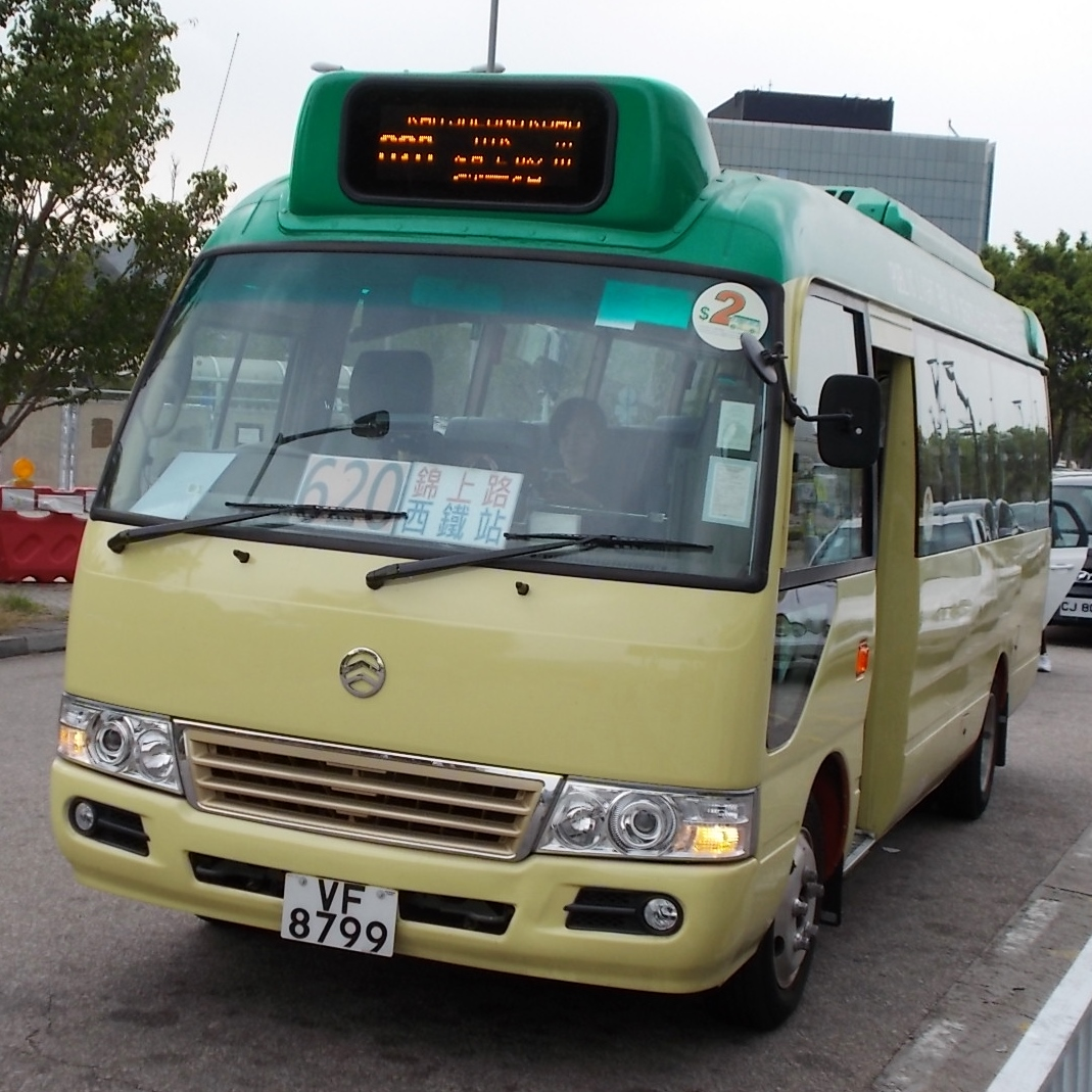 新界專線小巴620線，正停靠錦上路西鐵站